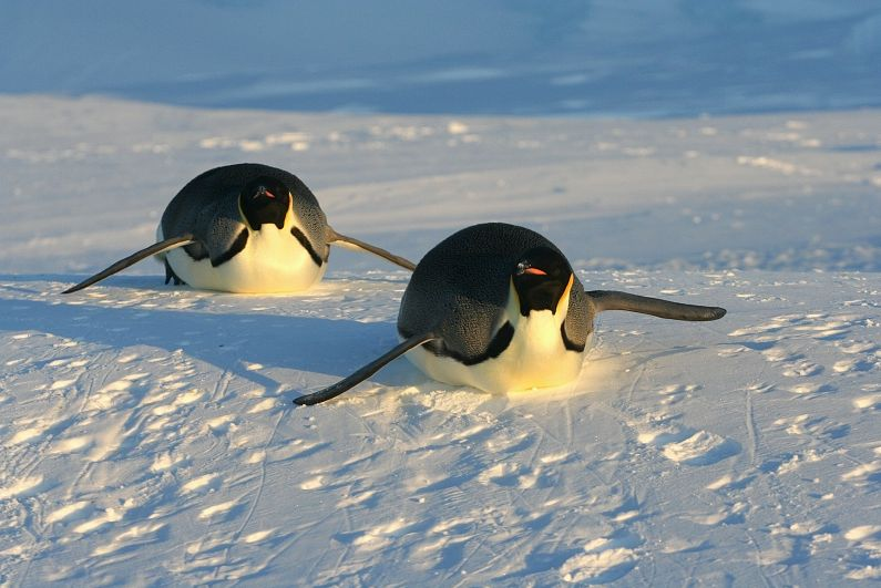 Manchots empereurs se déplaçant en toboganning